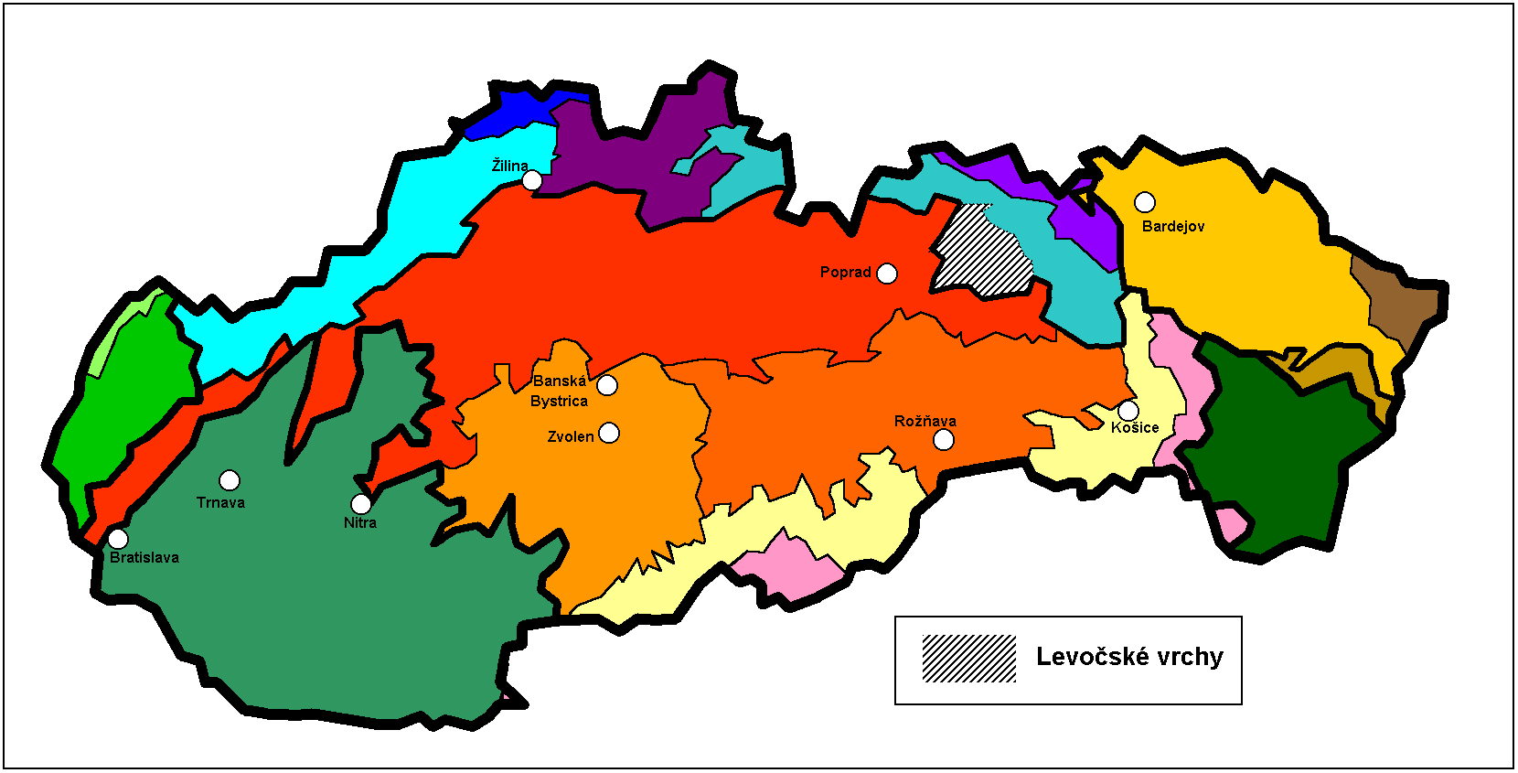 Levocské vrchy